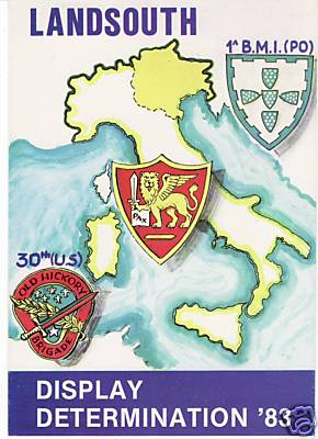 cartolina esercitazioni NATO 1983